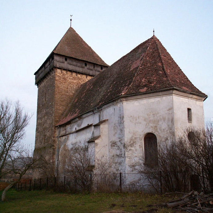 Biserica fortificată din Netuş